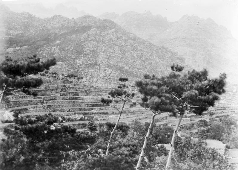 Schutzgebiet Kiautschou Sept. 1904: Panorama beim Kloster Hoa jun an (Tsingtau)